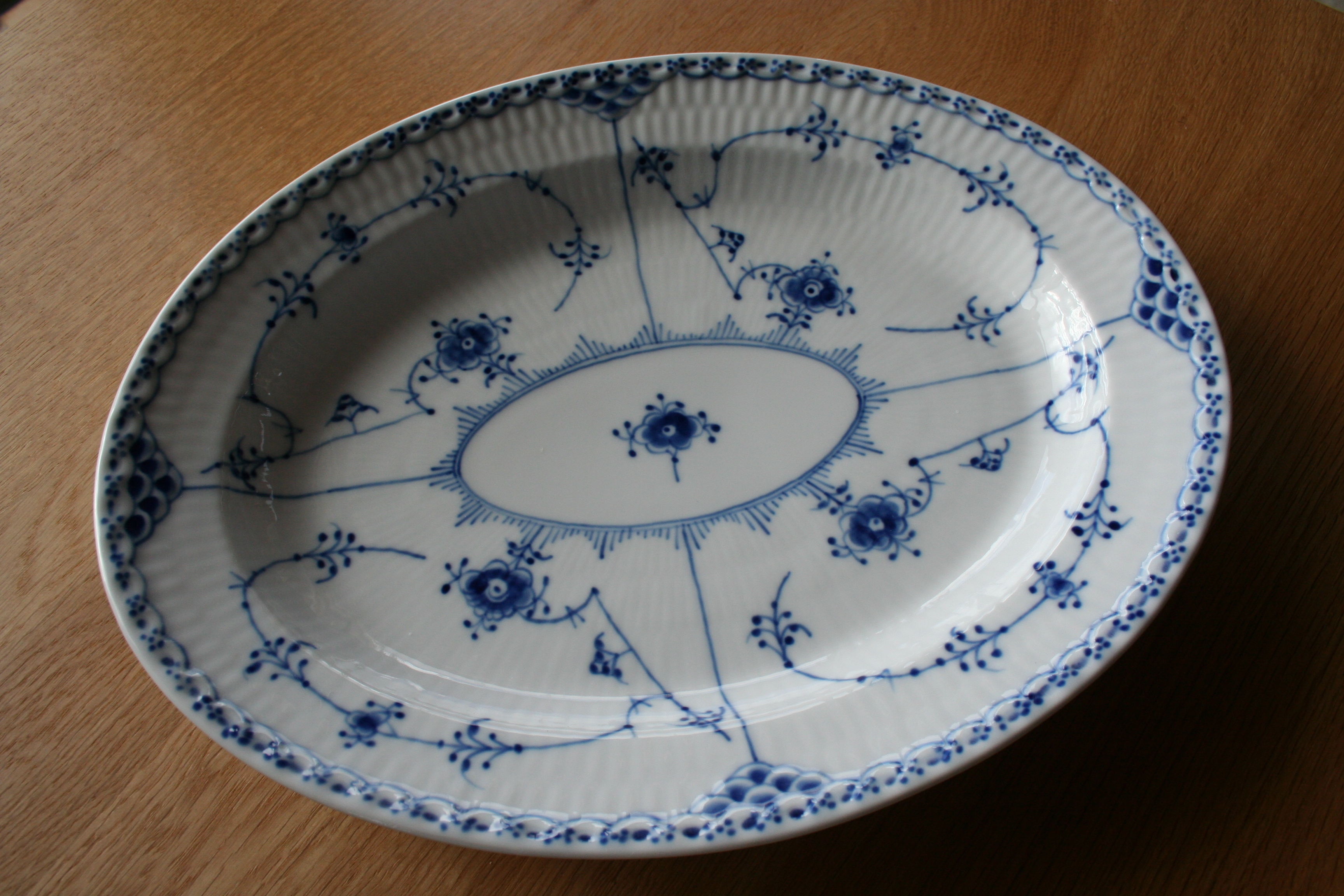 Blå riflet - trådmønster i koboltblått. Det første mønsteret fra Kongelig Dansk Porcelainsfabrik, og det produseres fremdeles. - Pattern Musselmalet.